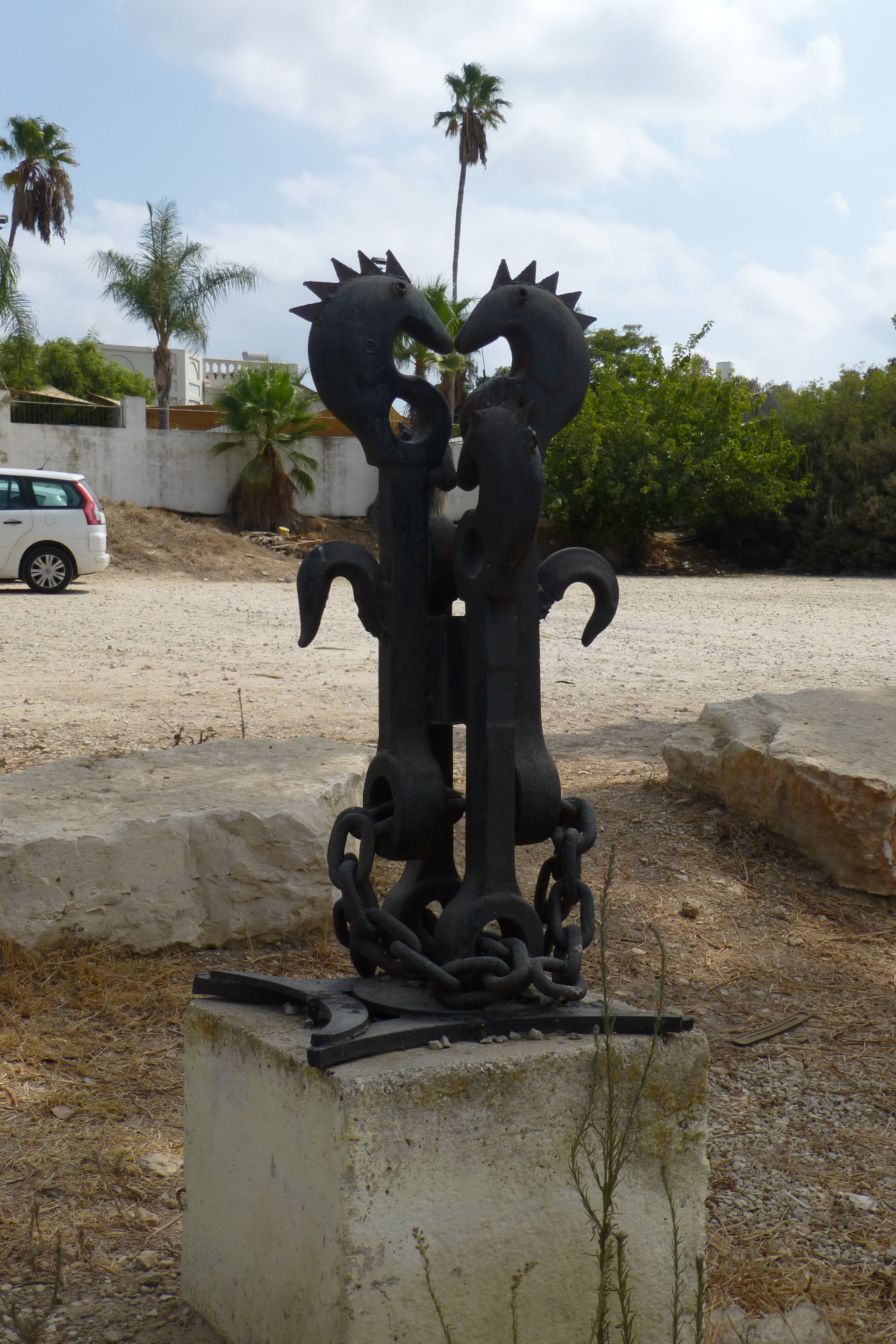 ביתו של דוד לוינסון. על פי צוואתו שבעל פה שימש ביתו החל ב-1952 כ"בית מרגוע לסופר ולמורה". בהמשך הפך לבית מרגוע לכל, לפנימיה לחינוך הדתי וכיום משמש כפנימיה לחינוך מיוחד.